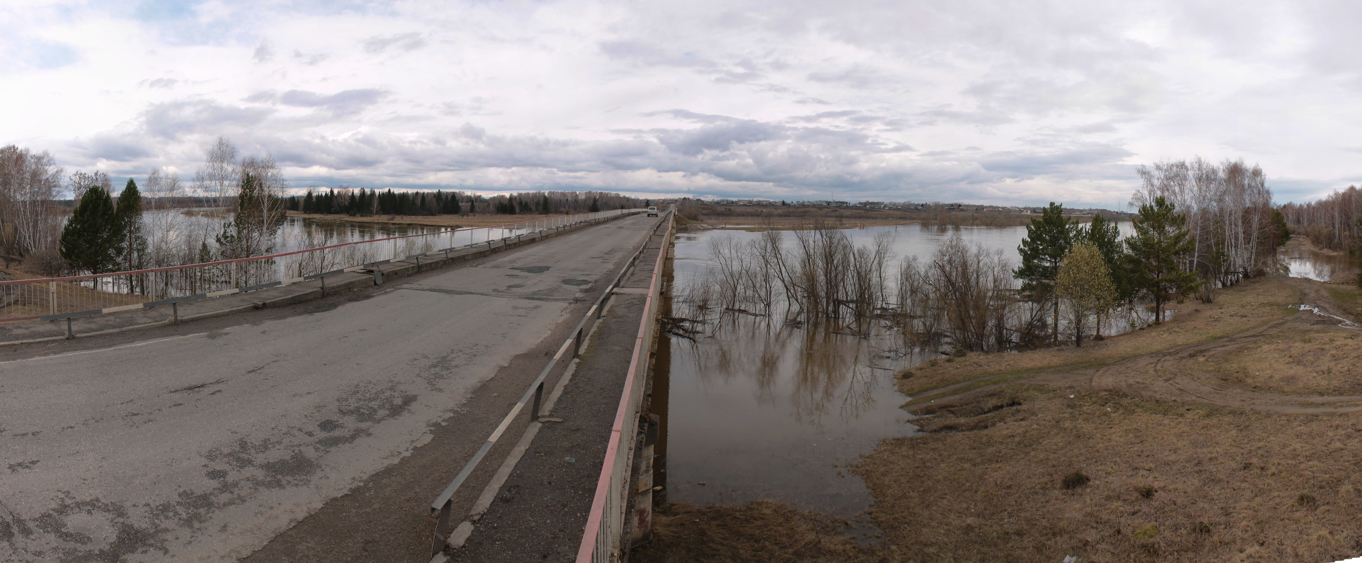 Мост через Яю. д. Большедорохово.